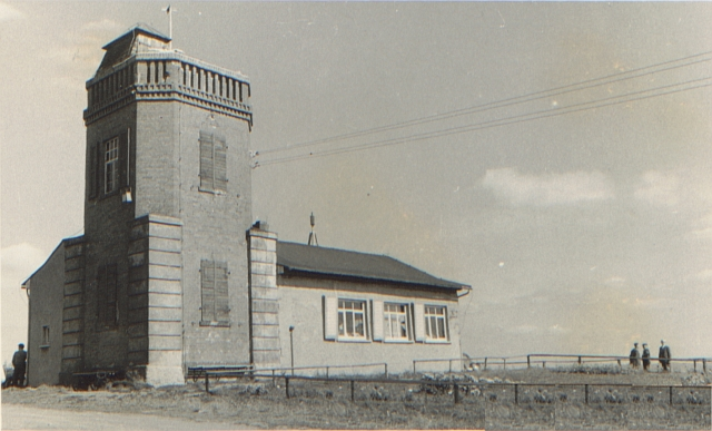 Barigauer Turm ab 59